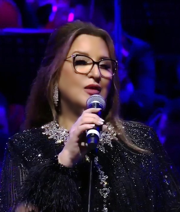 Cantante Marroquí Aziza Jalal